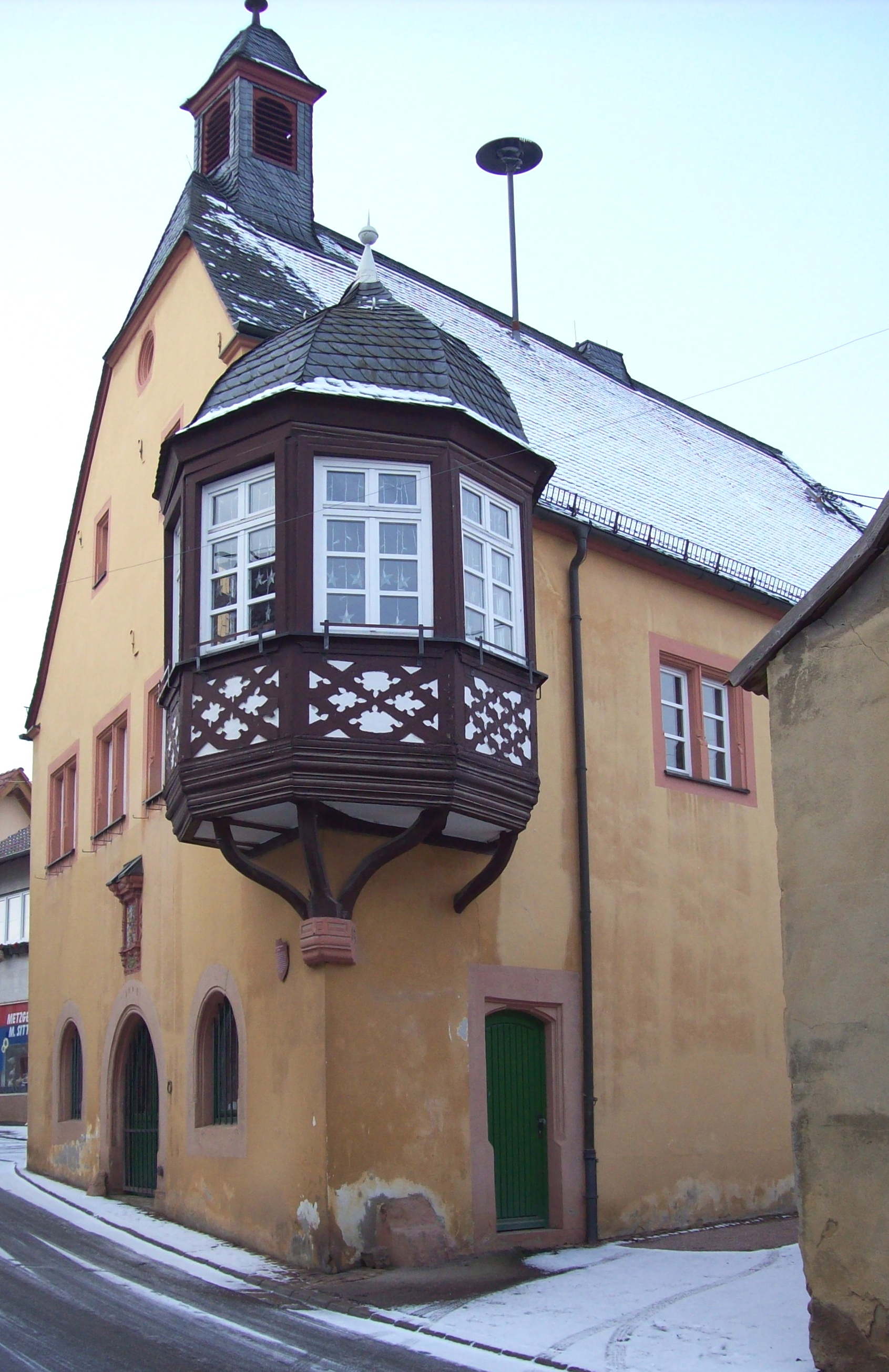 Historisches Rathaus von 1603 in Frei-Laubersheim, Rheinland-Pfalz, Deutschland